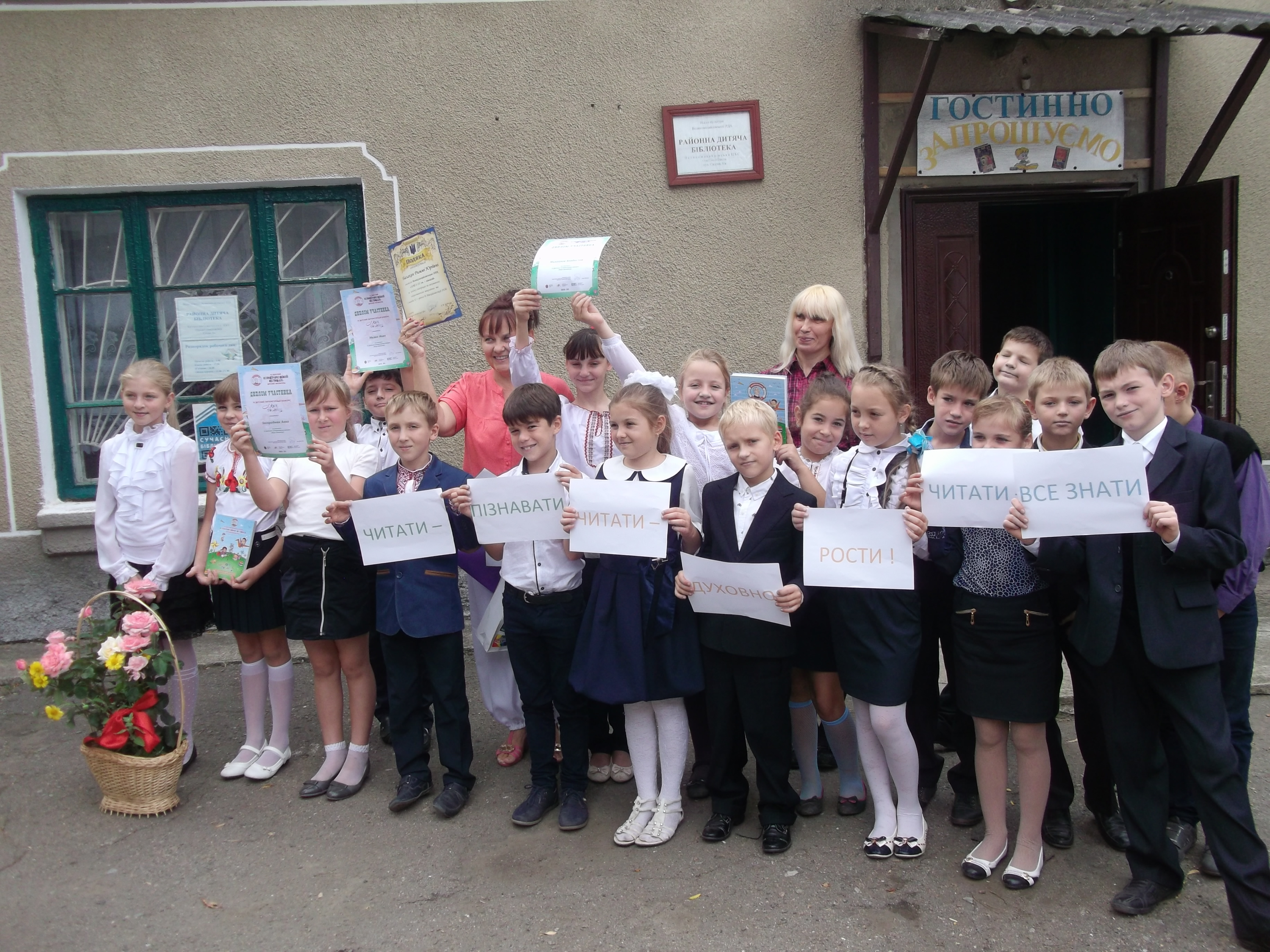 Великомихайлівська районна дитяча бібліотека